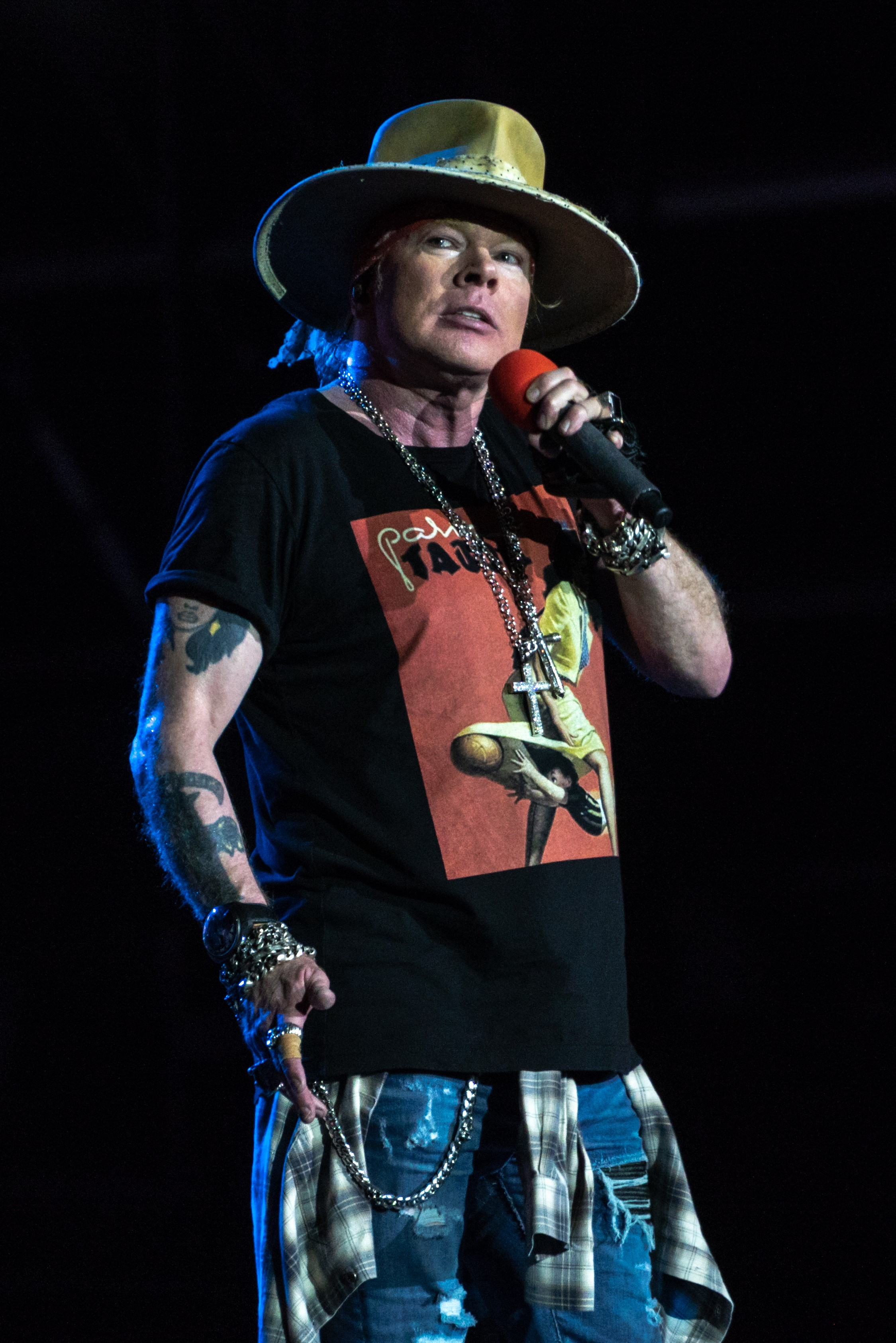 GNRChorzow090718-76